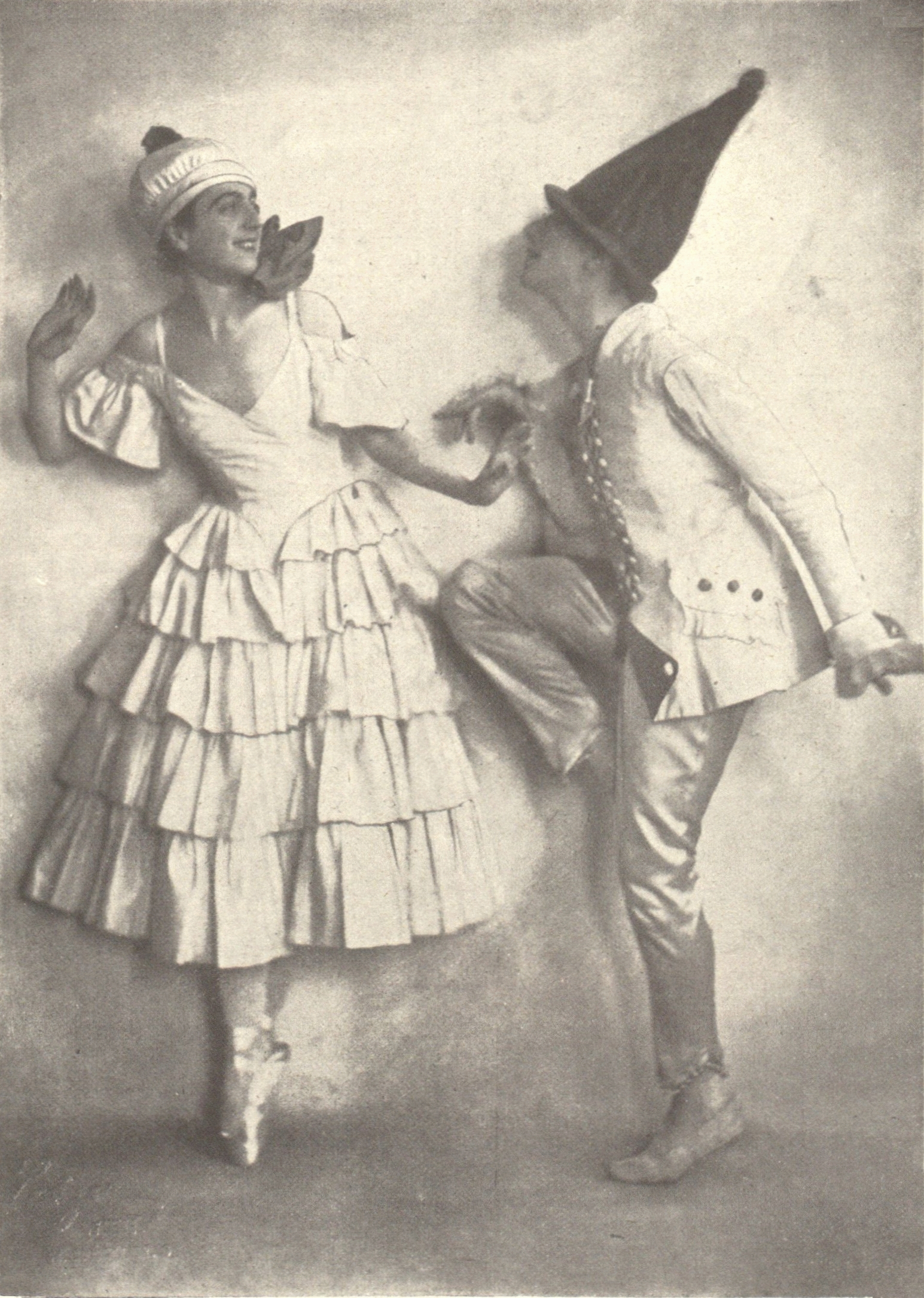 Lo Hesse und Joachim von Seewitz * Lo Hesse (1889 – circa 1983), German dancer * Joachim von Seewitz (legal name: Joachim Wilhelm Friedrich Carl Oscar von Brüsewitz; 1891–1966), German dancer